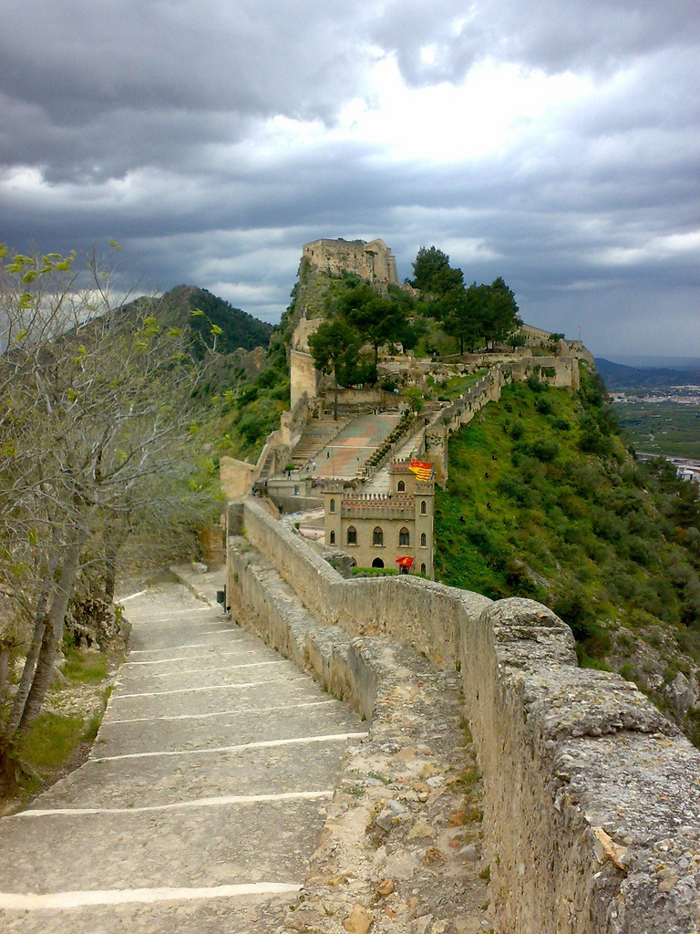 Castillo de Xátiva.